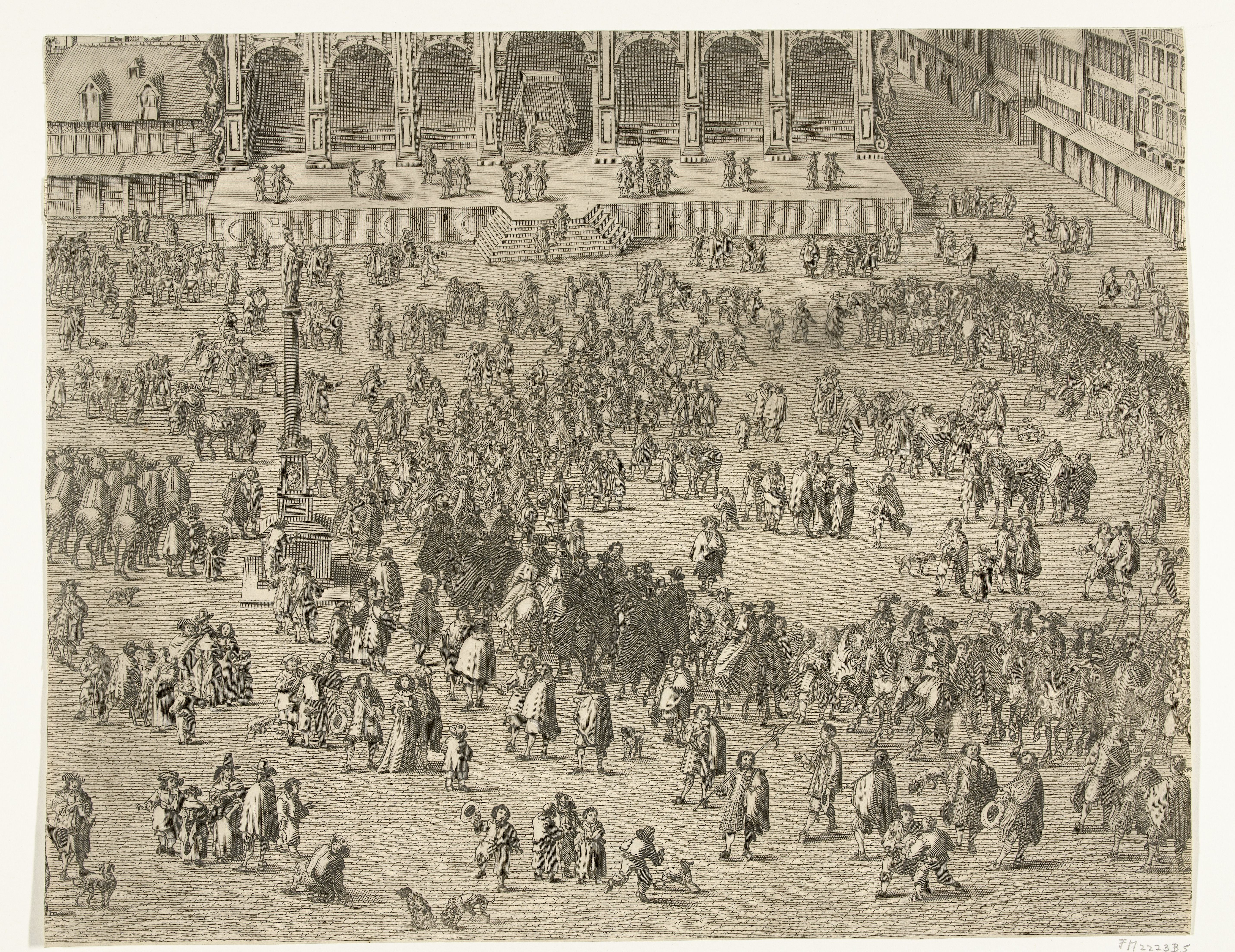 IdentificatieTitel(s): Proclamatie te Gent van Karel II van Spanje als graaf van Vlaanderen (blad 5), 1666Objecttype: prent Objectnummer: RP-P-OB-81.980Catalogusreferentie: FMH 2223-B/5Opmerking: (toegevoegd nummer RPK)Hollstein Dutch 50-Pl. 5Omschrijving: Ceremonie op de Vrijdagmarkt te Gent bij de proclamatie van de Spaanse koning Karel II als graaf van Vlaanderen, 2 mei 1666. Blad 5 in een ongemonteerde ensemble van 12 platen van de ceremonie en cavalcade op het plein en 118 portretten van de hoogWaar: digheidsbekleders die bij de plechtigheid aanwezig waren.VervaardigingVervaardiger: prentmaker: Lucas Vorsterman (II) naar tekening van: Jacques van WerdenPlaats vervaardiging: Zuidelijke NederlandenDatering: 1666 - 1667Fysieke kenmerken: ets en gravureMateriaal: papier Techniek: etsen / graveren (drukprocedé)Afmetingen: blad: h 354 mm × b 444 mmToelichtingNiet in Frederik Muller; door het RPK toegevoegd nummer.OnderwerpWat: ceremonial procession, parade, pageant ~ installation of a rulerfestivities (+ parade, pageant, cavalcade ~ festive activities)Wanneer: 1666-05-02 - 1666-05-02WaarVrijdagmarktWie: Karel II (koning van Spanje)Verwerving en rechtenVerwerving: onbekendCopyright: Publiek domein